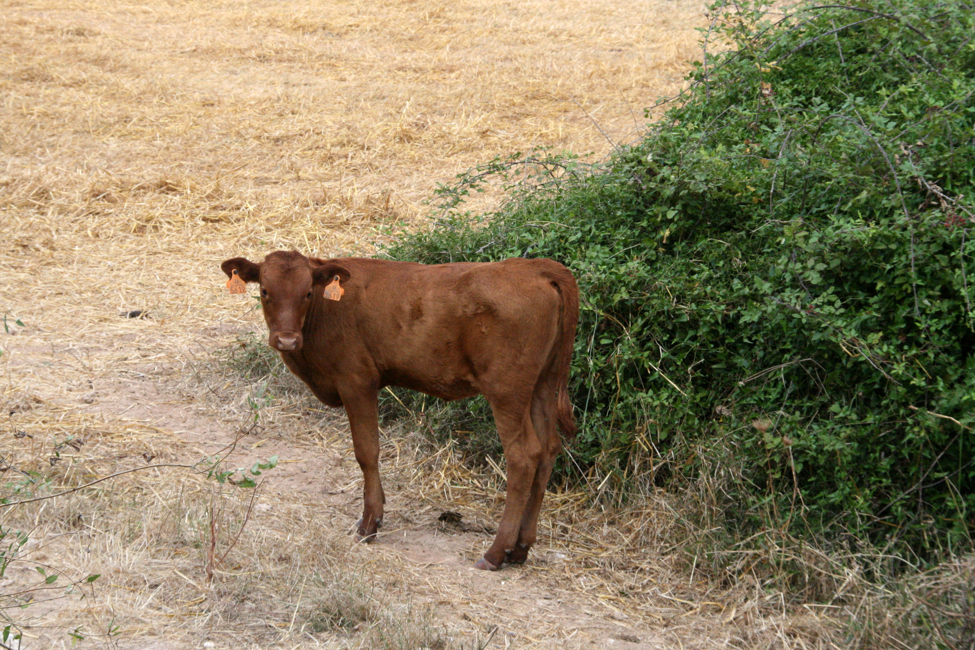 Vaca menorquina en el barranc de Son Boter o de sa Vall This is a photography of a Special Area of Conservation in Spain with the ID: ES0000238. Natura2000 entry, EEA entry